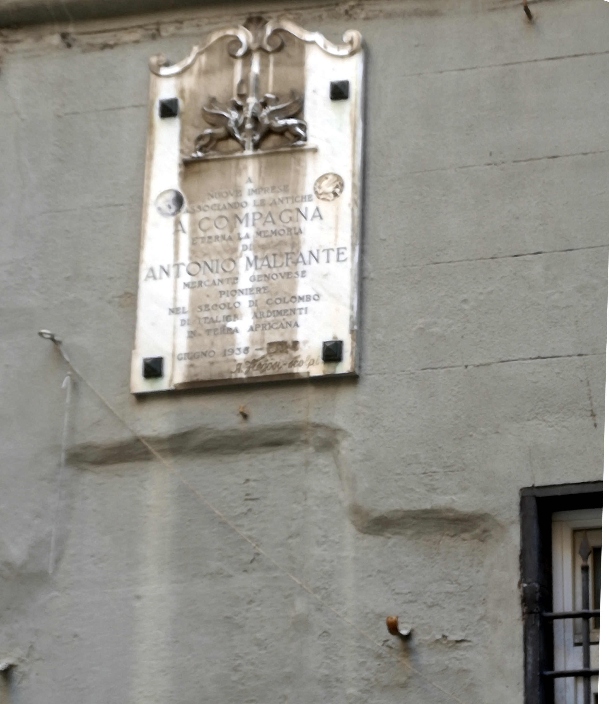 Targa in ricordo del mercante Antonio Malfante in Piazza Cattaneo